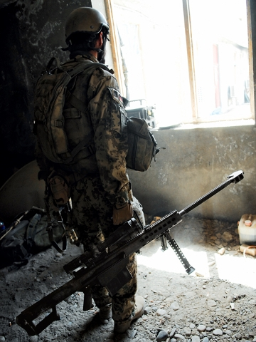 Konzentriert vor dem Abmarsch: Mit dabei, das G82